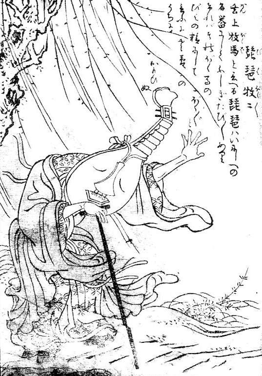 Biwa-bokuboku (琵琶牧々) from the Gazu Hyakki Tsurezure Bukuro (百器徒然袋)